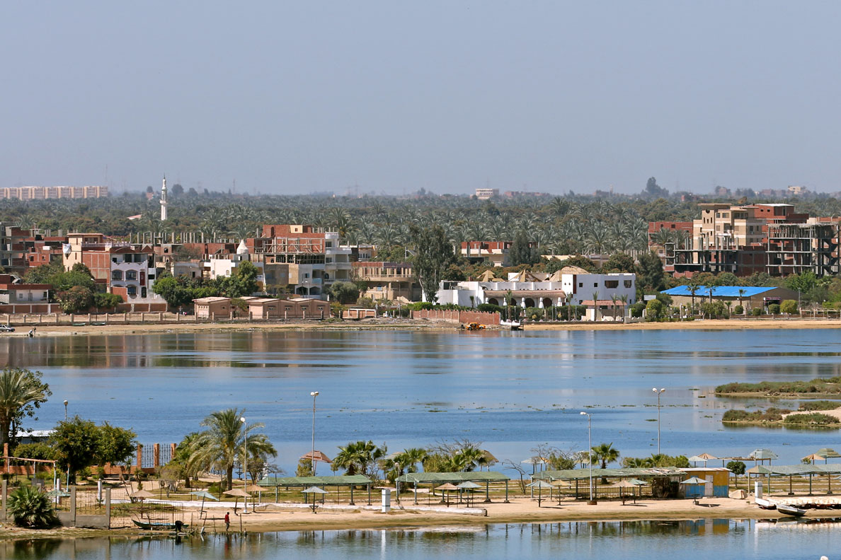 Ismailia and Timsah lake